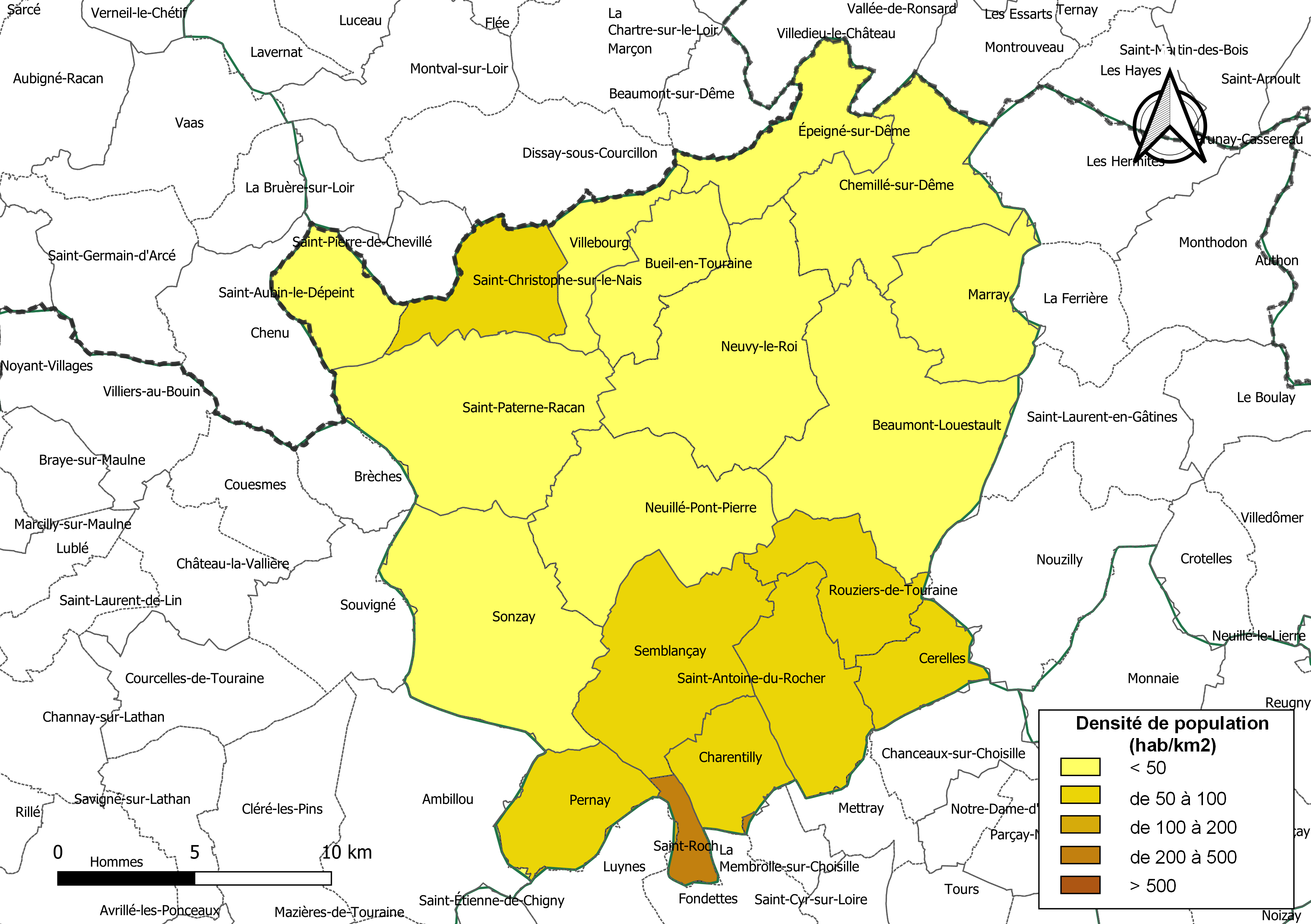 Carte des densités de population (millésimée 2016) des communes de la communauté de communes la Communauté de communes de Gâtine et Choisilles - Pays de Racan, département d'Indre-et-Loire, France. Composition au 1er janvier 2019.